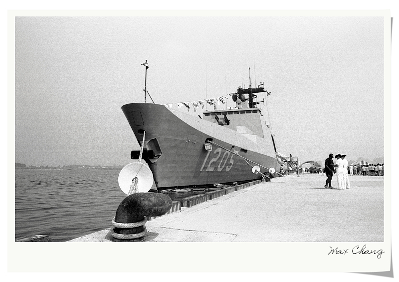 中華民國海軍99年敦睦遠航訓練支隊國內環島航訓，海軍昆明軍艦（PFG3-1205）開放參觀。